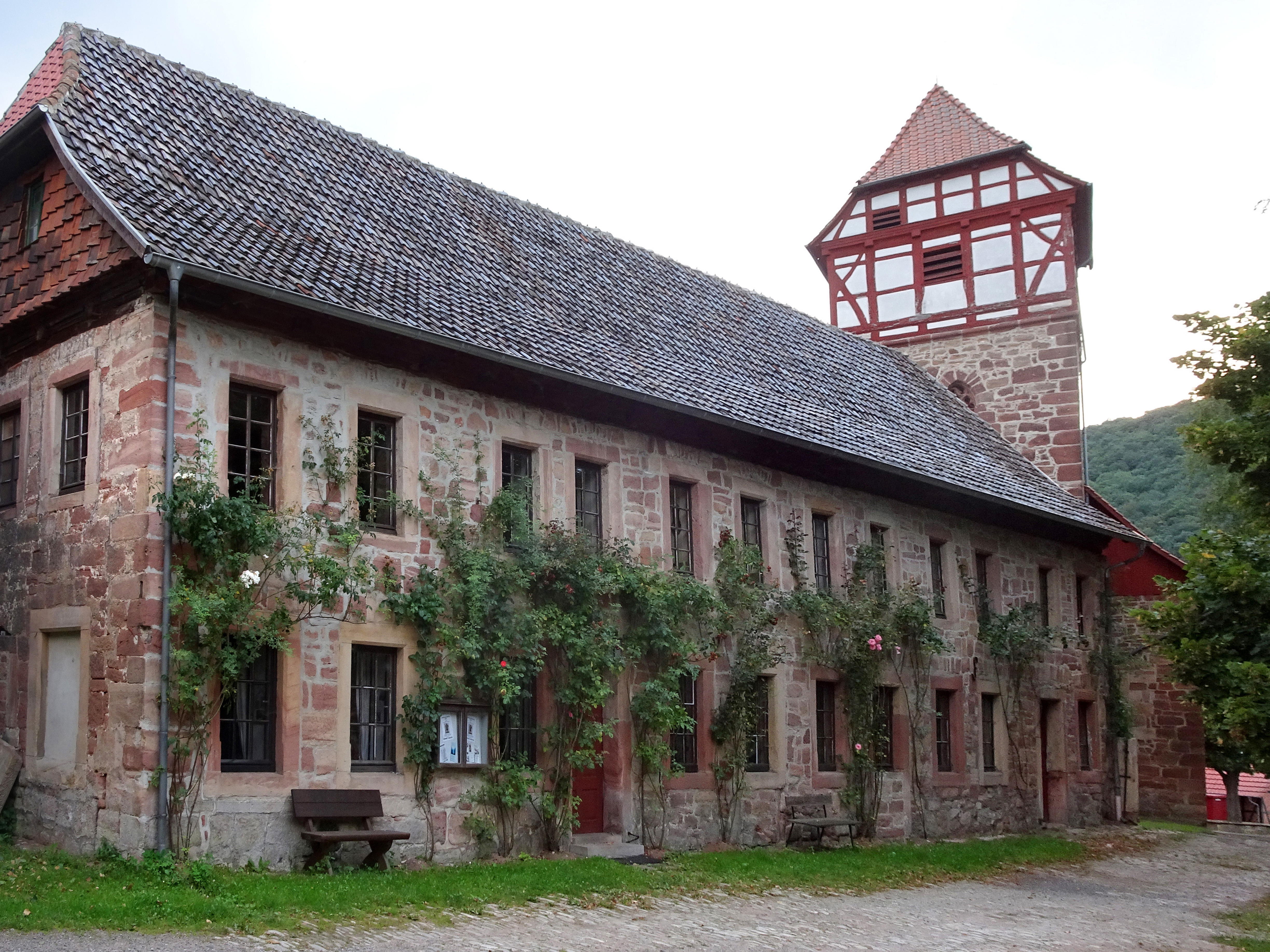 Der Schlosshof in Wichmannshausen. Wichmannshausen ist ein Stadtteil von Sontra im nordhessischen Werra-Meißner-Kreis. In dem ehemaligen Wohngebäude des Schlosses zeigt das Heimatmuseum „Museum im Alten Boyneburger Schloss e.V.“ seine volkskundliche Ausstellung. Dahinter die St. Martinskirche.